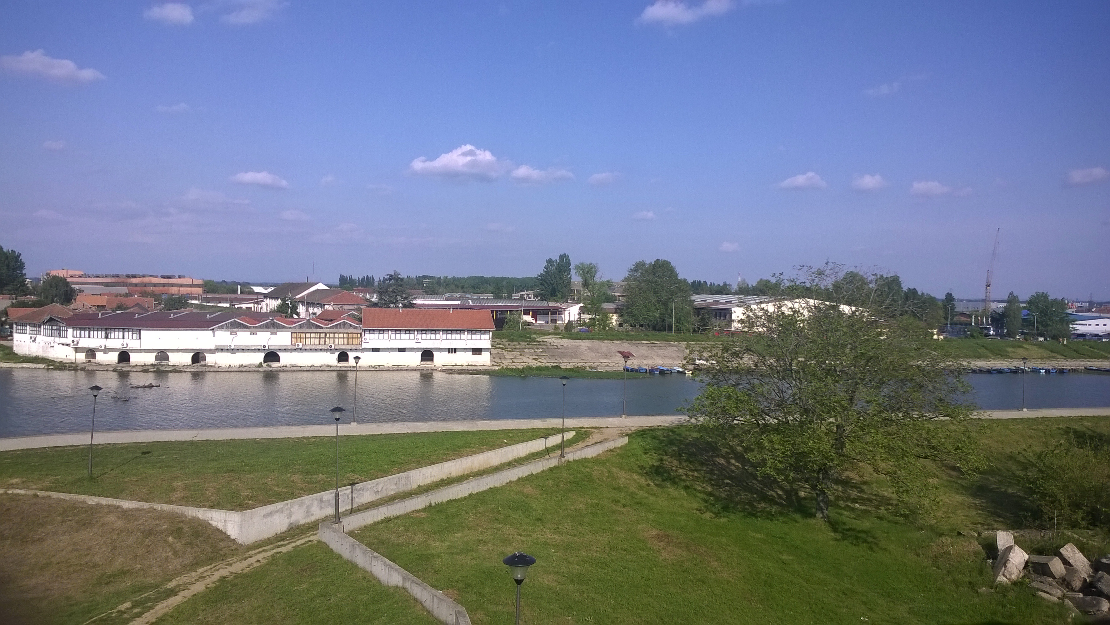 Smederevo, Serbia